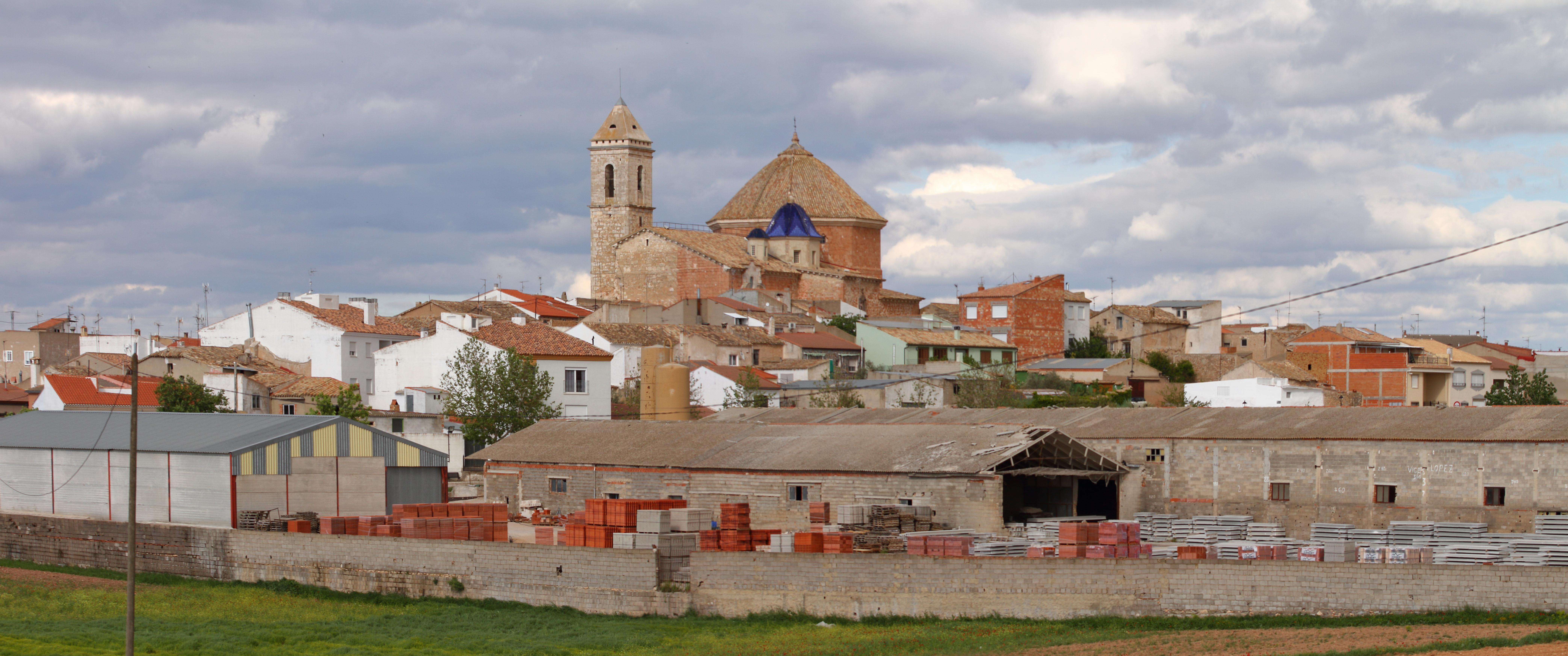 Alborea, vista panorámica desde el sur de la población